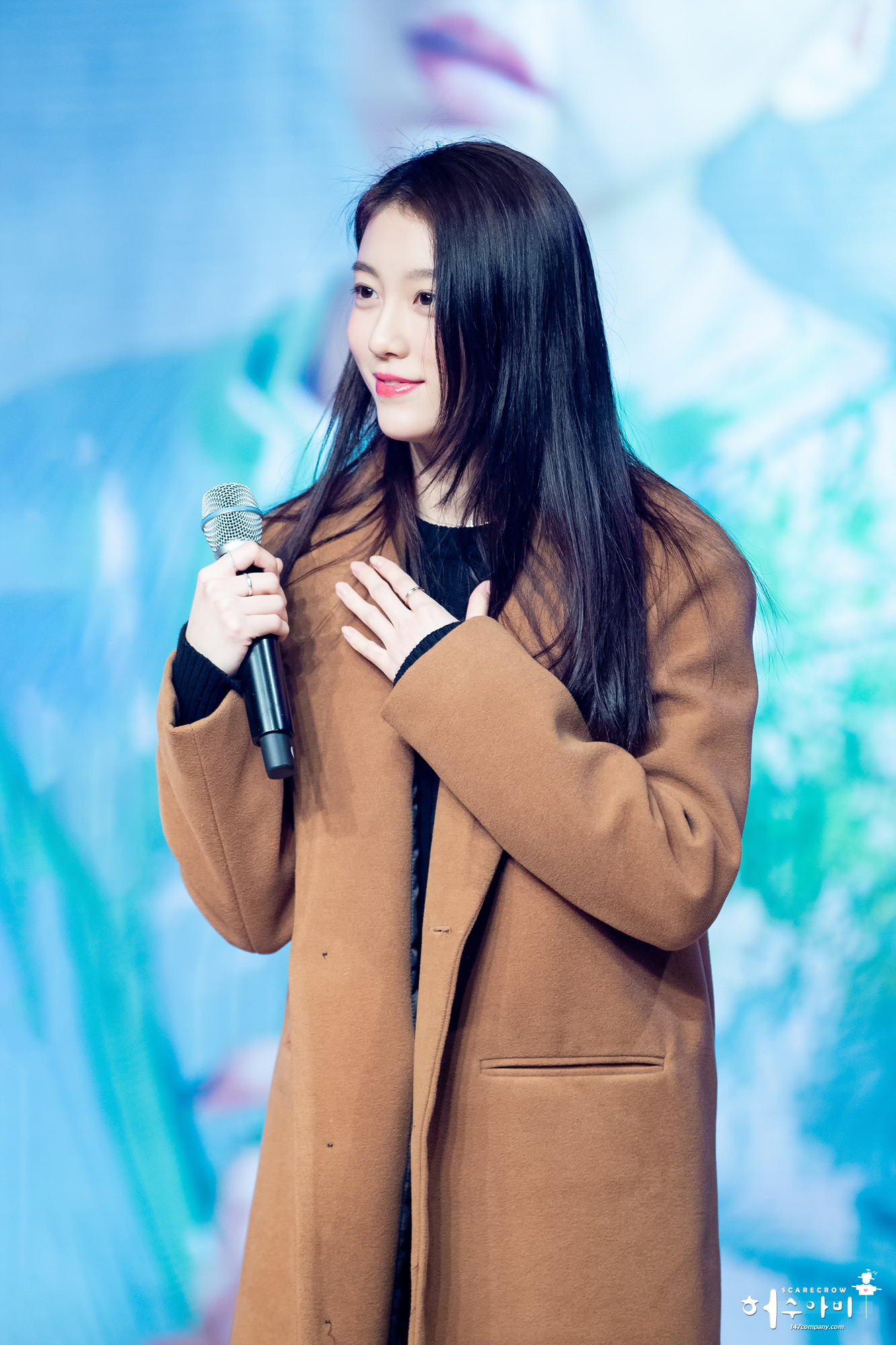 [19.01.05] 윤조 팬미팅 직찍 ( 유니티 수지 )